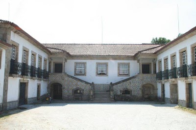 Casa de Pascoais - Casa em Amarante, Portugal Cultural property Casa de Pascoaes, Gatão, Amarante (São Gonçalo), Madalena, Cepelos e Gatão, Amarante, Tâmega e Sousa subregion, Norte region, Continental Portugal, Portugal Q66814659, SIPA ID: 4833, DGPC ID: 73942 Wiki Loves Monuments ID: DGPC-73942